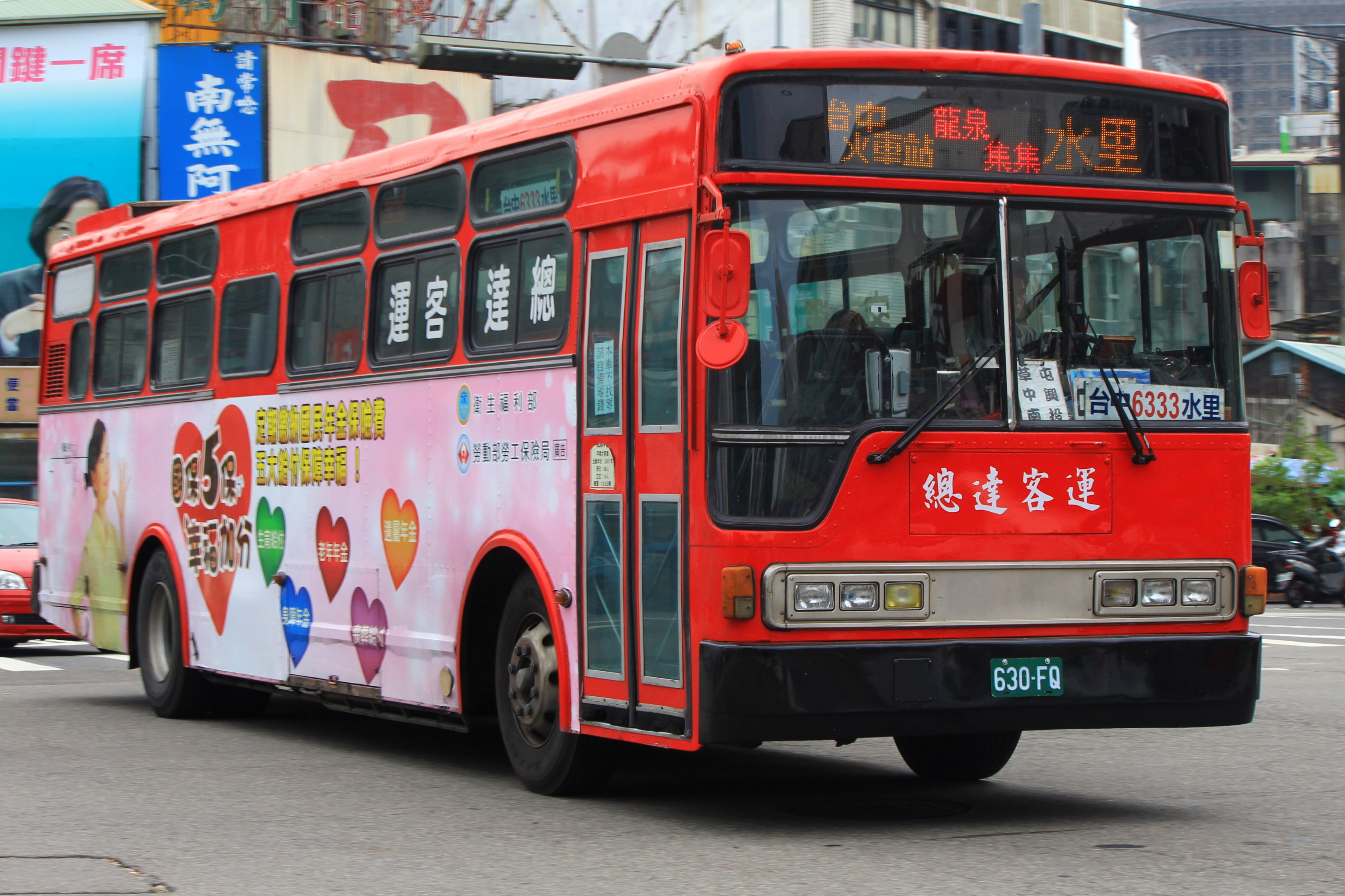 抵達終點~干城站